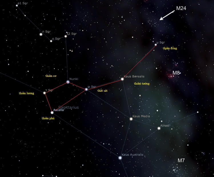 chiêm tinh học, tử vi,chòm sao nam đẩu , thất sát, thiên lương, thiên đồng,thiên tướng,thiên phủ,thiên cơ